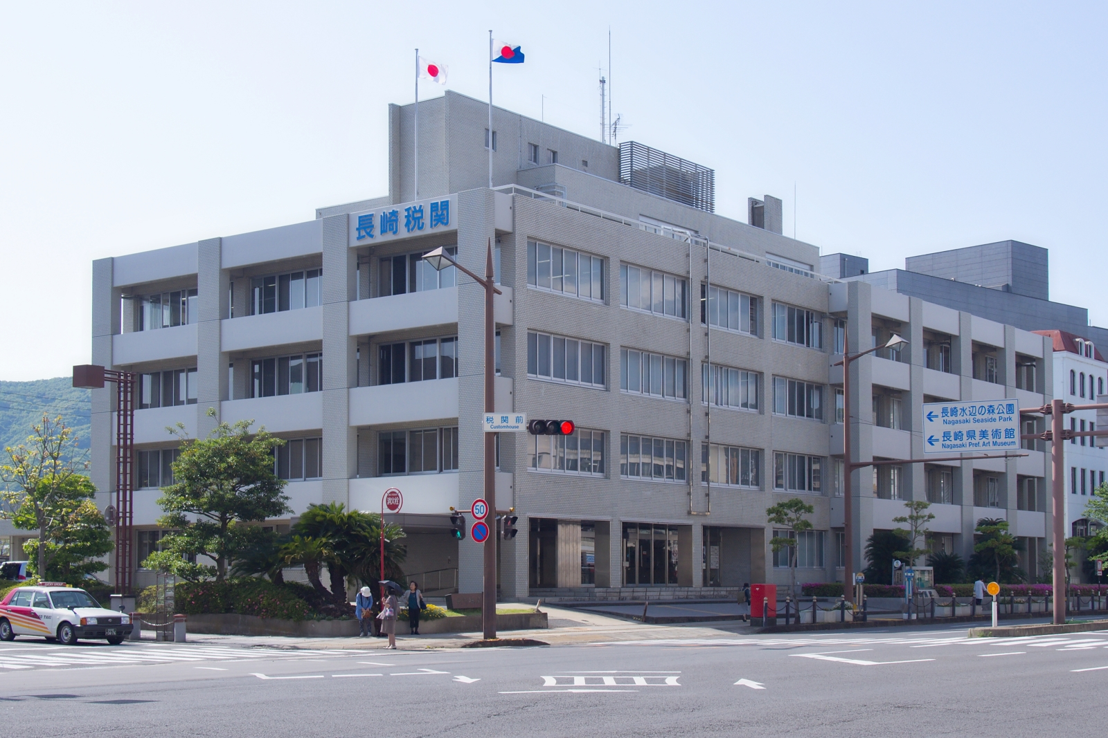 長崎税関庁舎（長崎県長崎市）